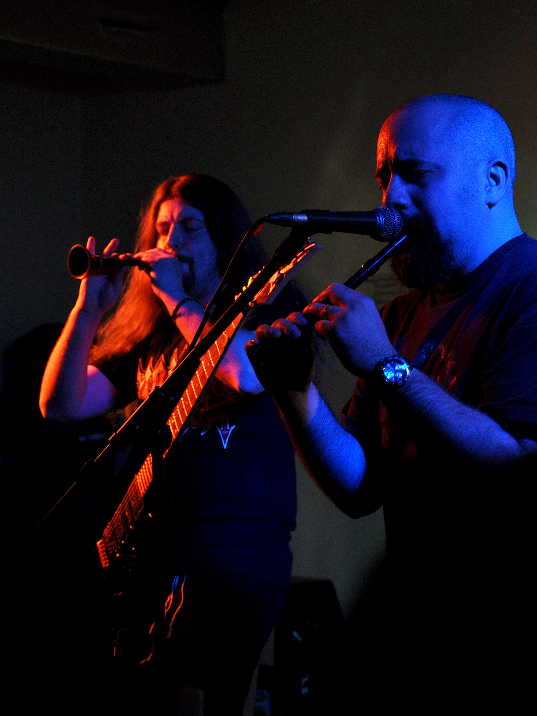 Heol Telwen au Sequanian Fest (14/03/09), organisé par la Horde Sequane à Blamont: Gwadsech'hedik Kraban (à gauche) et Hades. Heol Telwen est un groupe de Folk Metal originaire de Paris.